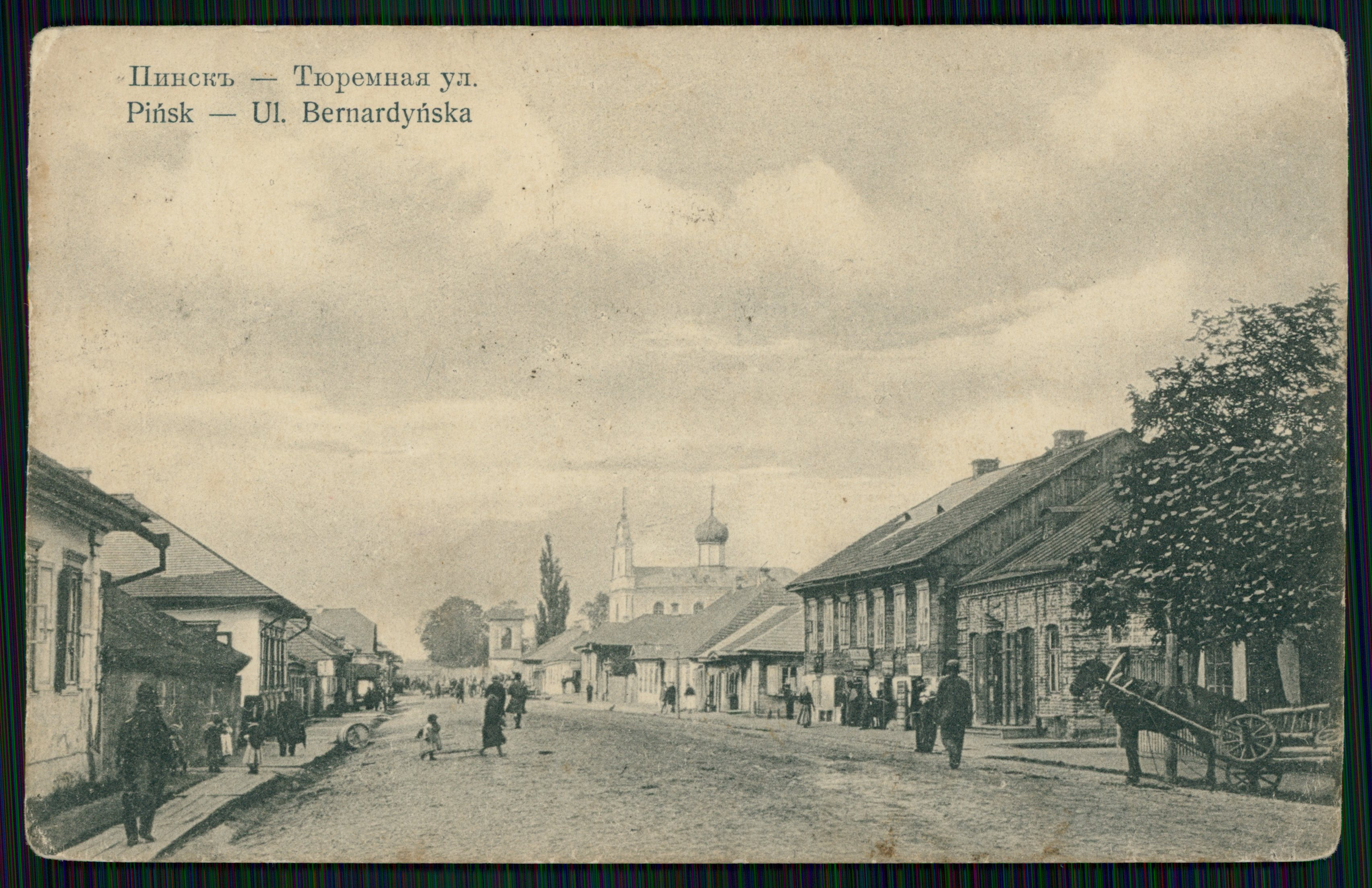 Беларуская (тарашкевіца): Пінск (Pinsk), вуліца Бэрнардынская (vulica Bernardynskaja). Колішні касьцёл Сьвятога Міхала Арханёла пры кляштары бэрнардынаў. Традыцыйная гістарычная назва як перакладная ў подпісе